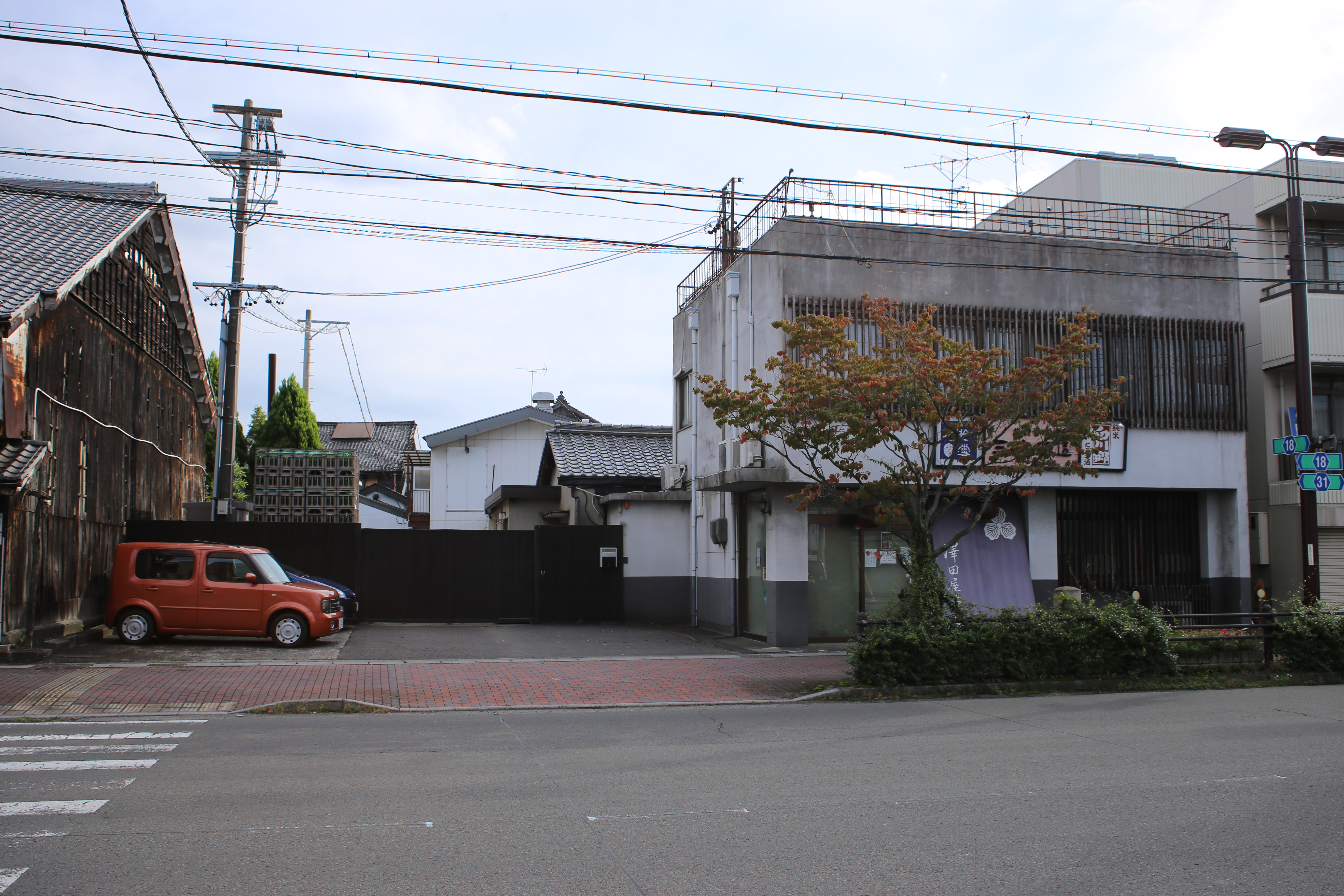 岐阜県大垣市の三輪酒造